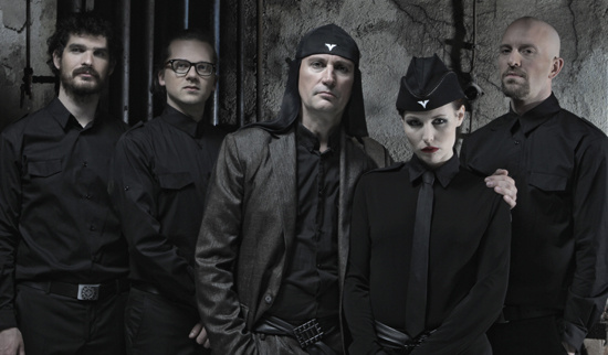 Laibach, Pressefoto 2011